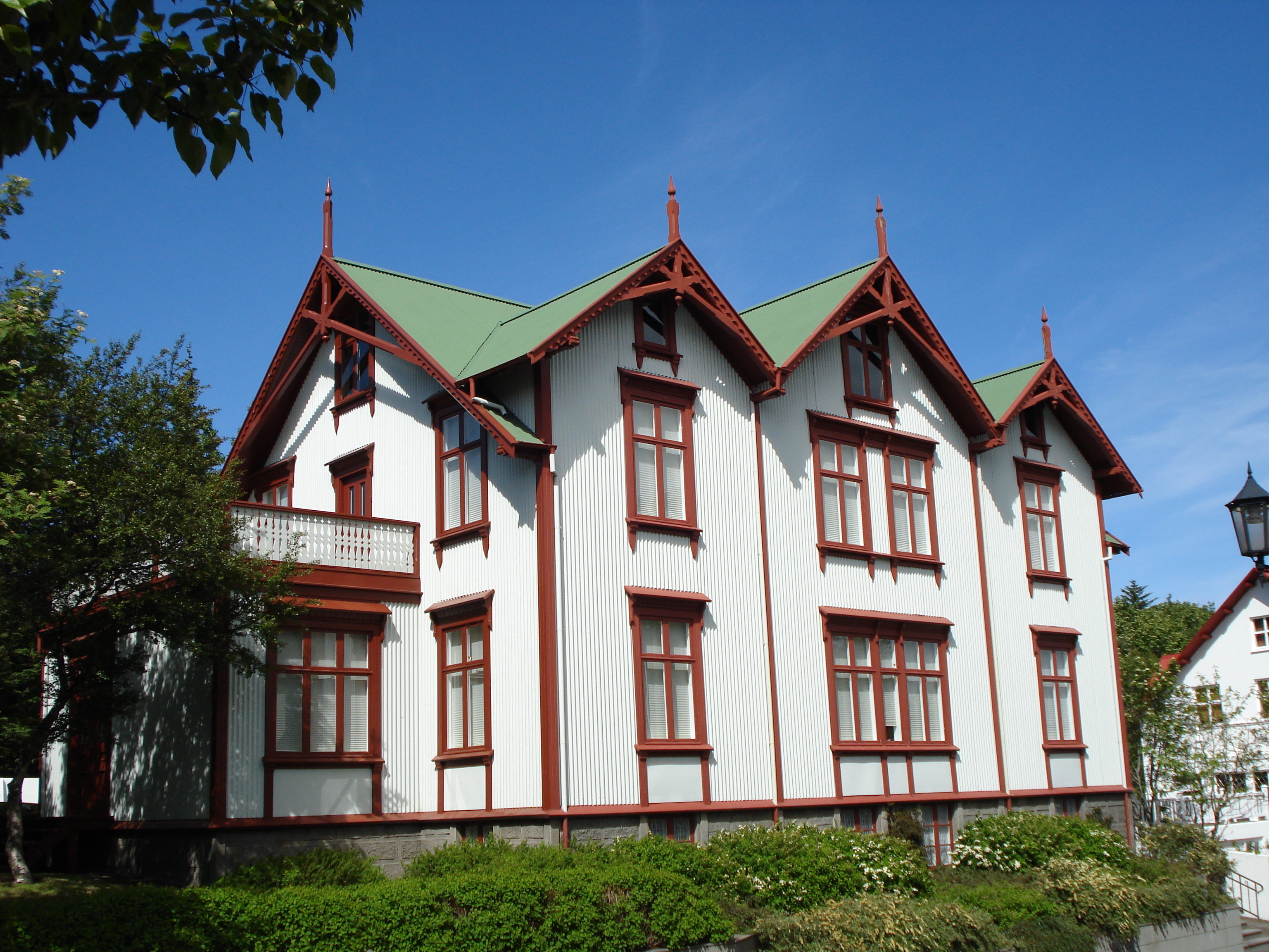 Ráðherrabústaðurinn, Tjarnargötu 32 (við Tjörninn), Reykjavík, Iceland Gjöf til Hannesar Hafstein ráðherra 1904 Frá Hans Ellefsen, norskum hvalfangara. Bústaðurinn var fyrst reistur 1892 að Sólbakka við Flateyri. Endurbyggður í Reykjavík 1906.